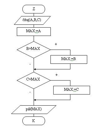 algoritmus hľadania maxima z troch čísel